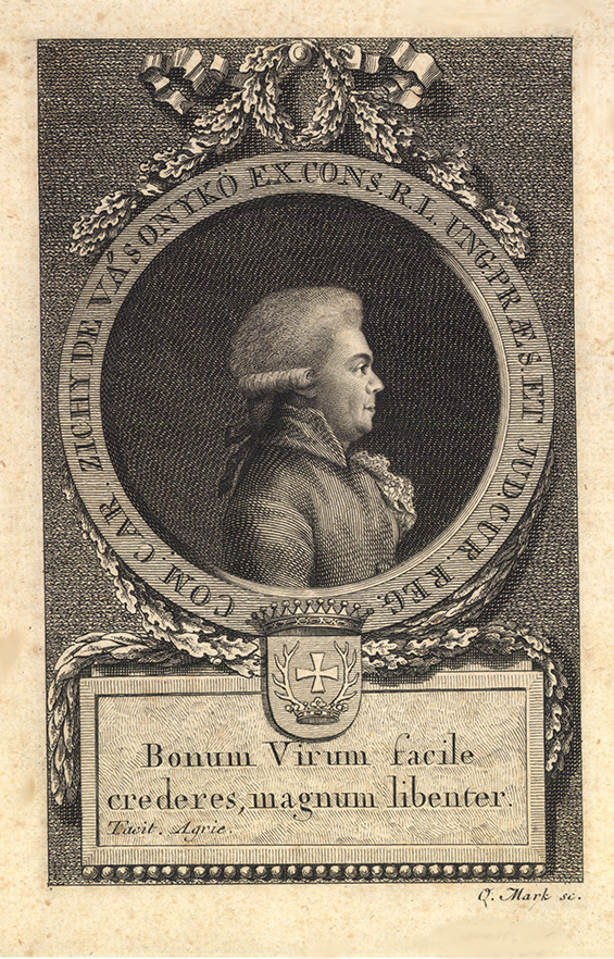 Com. Car. Zichy de Vásonykő Zichy Károly József Franz Xaver Kasimir Johann von Nepomuk, gróf (Pozsony, 1753. március 4. – Bécs, 1826. szeptember 28.) nagybirtokos, országbíró, miniszter, Békés vármegye főispánja.